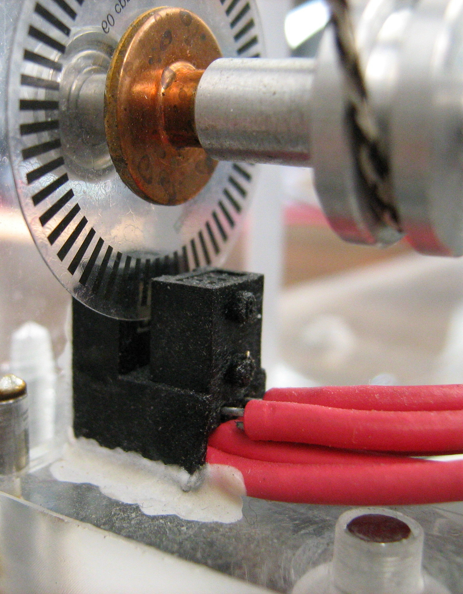 Inkrementalgeber mit Gabellichtschranke, Schlagwörter: Drehgeber, Winkelgeber, Sensor, Inkremental, Lichtschranke